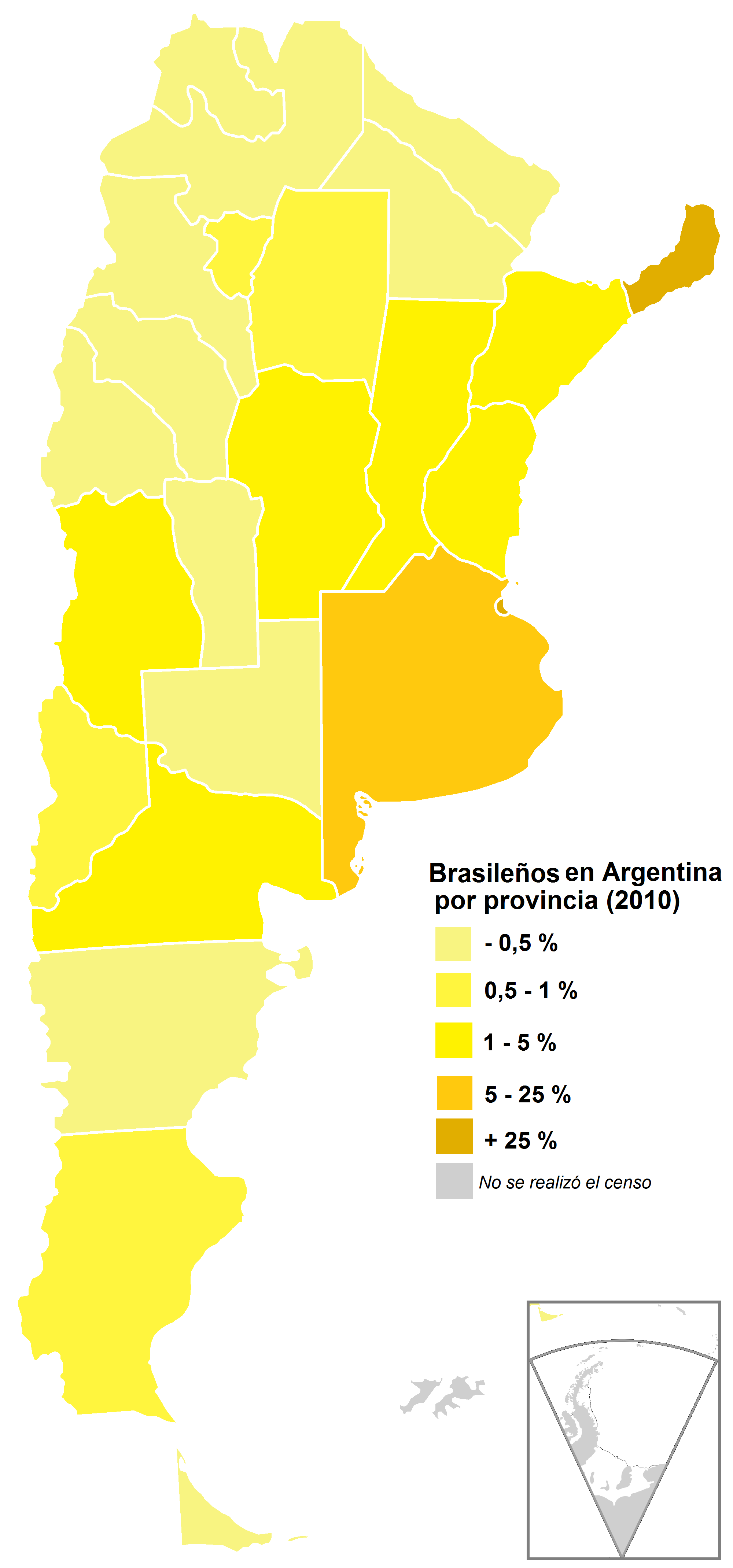 República Argentina por provincia. Población nacida en Brasil, en porcentaje. Año 2010. Fuente: Censo 2010 - INDEC.